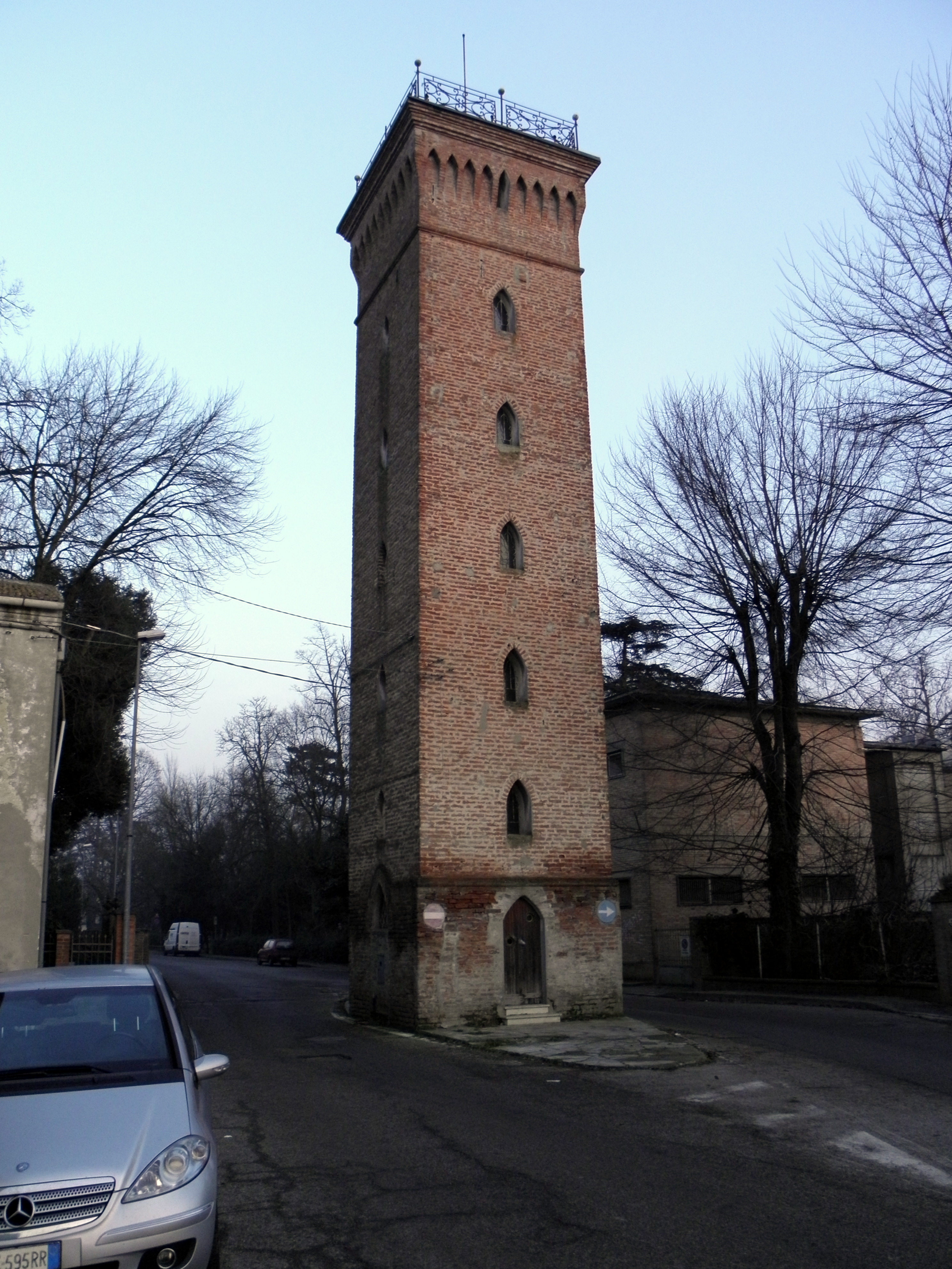 Migliarino, già comune autonomo e dal 2014 frazione di Fiscaglia: la Torre Pavanelli sita in Via Antonio Gramsci.